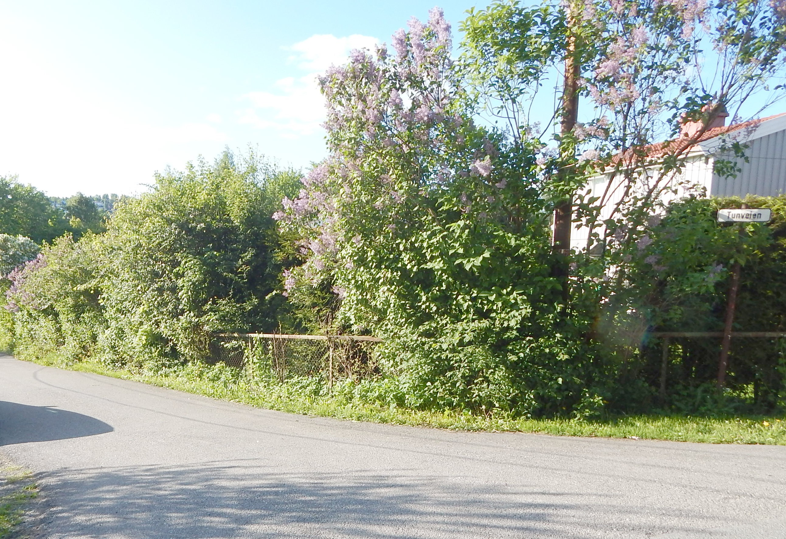 Tunveien